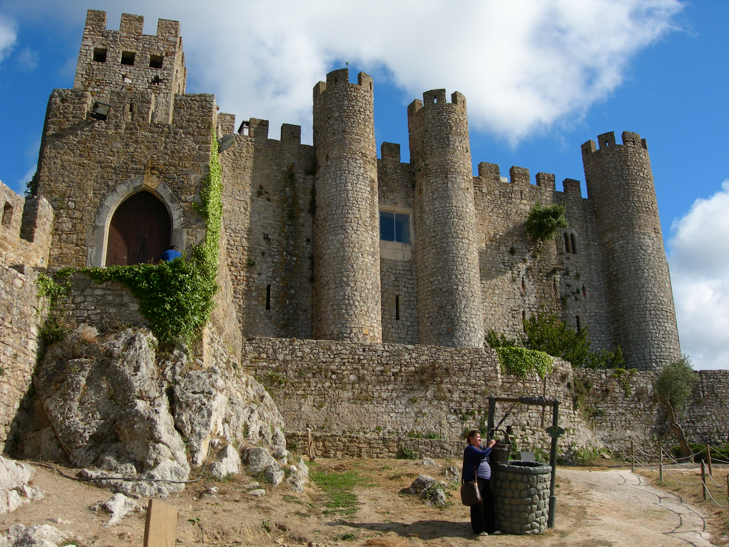 Castelo de Óbidos X This file was uploaded for Wiki Loves Monuments in Portugal with the unique identifier 70427.